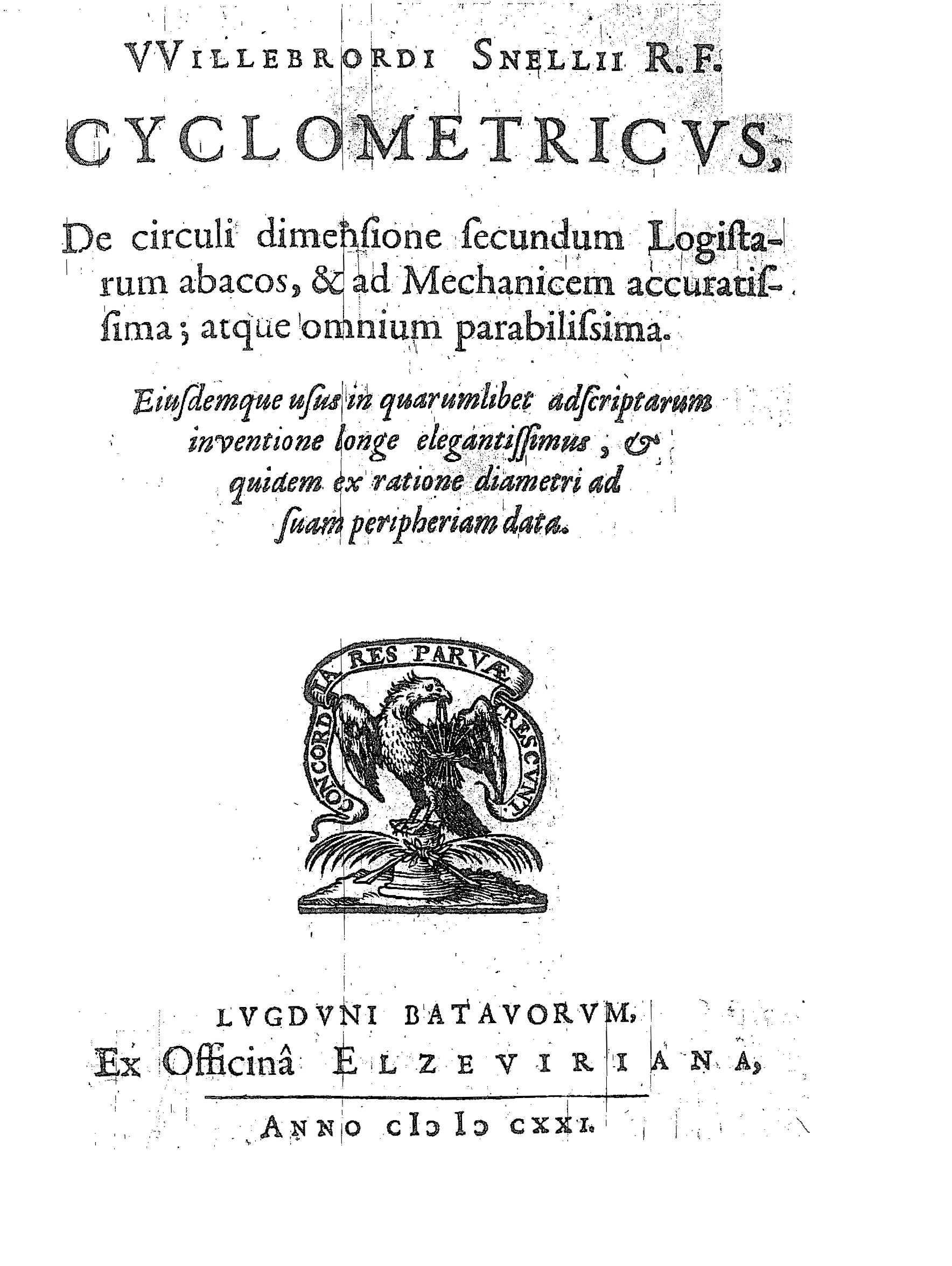 VVillebrordi Snellii R.F. Cyclometricus, de circuli dimensione secundum logistarum abacos, & ad mechanicem accuratissima; atque omnium parabilissima. Eiusdemque usus in quarumlibet adscriptarum inventione longe elegantissimus, & quidem ex ratione diametri ad suam peripheriam data. - Lugduni Batavorum : ex officina Elzeviriana, 1621. - [20], 102, [2] p. : ill. ; 4º .